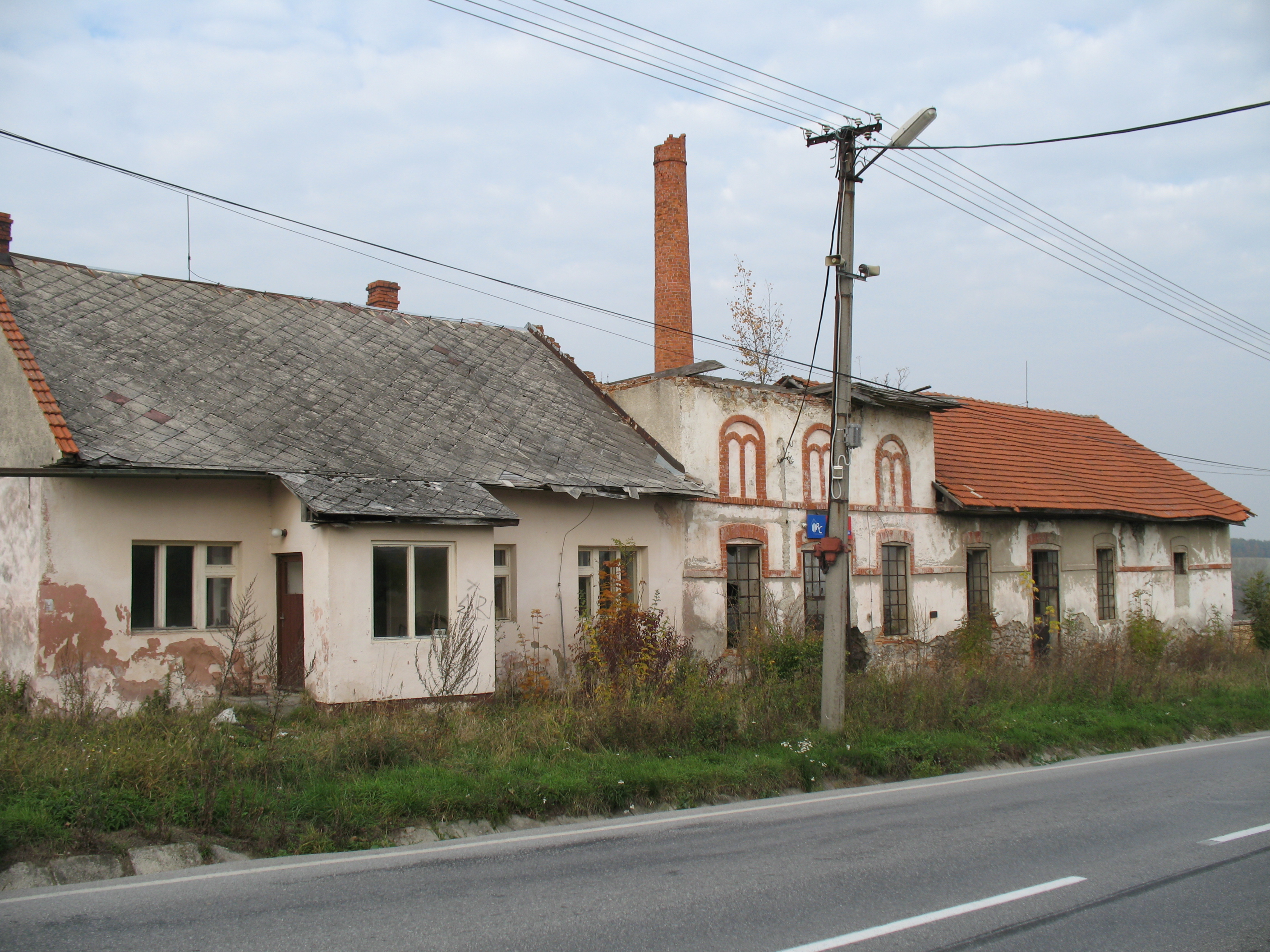 Turócábrahámfalva